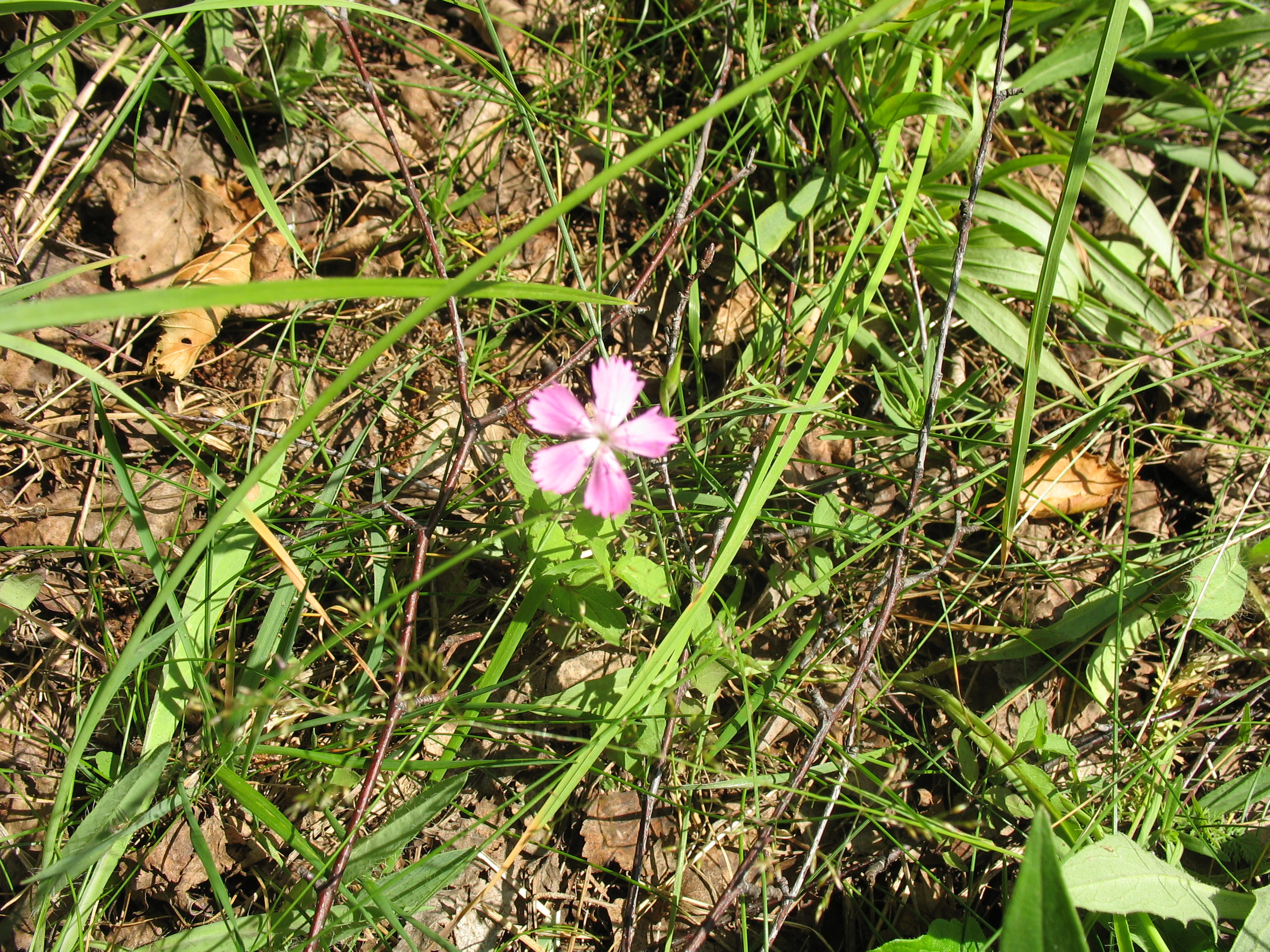 Полевая гвоздика